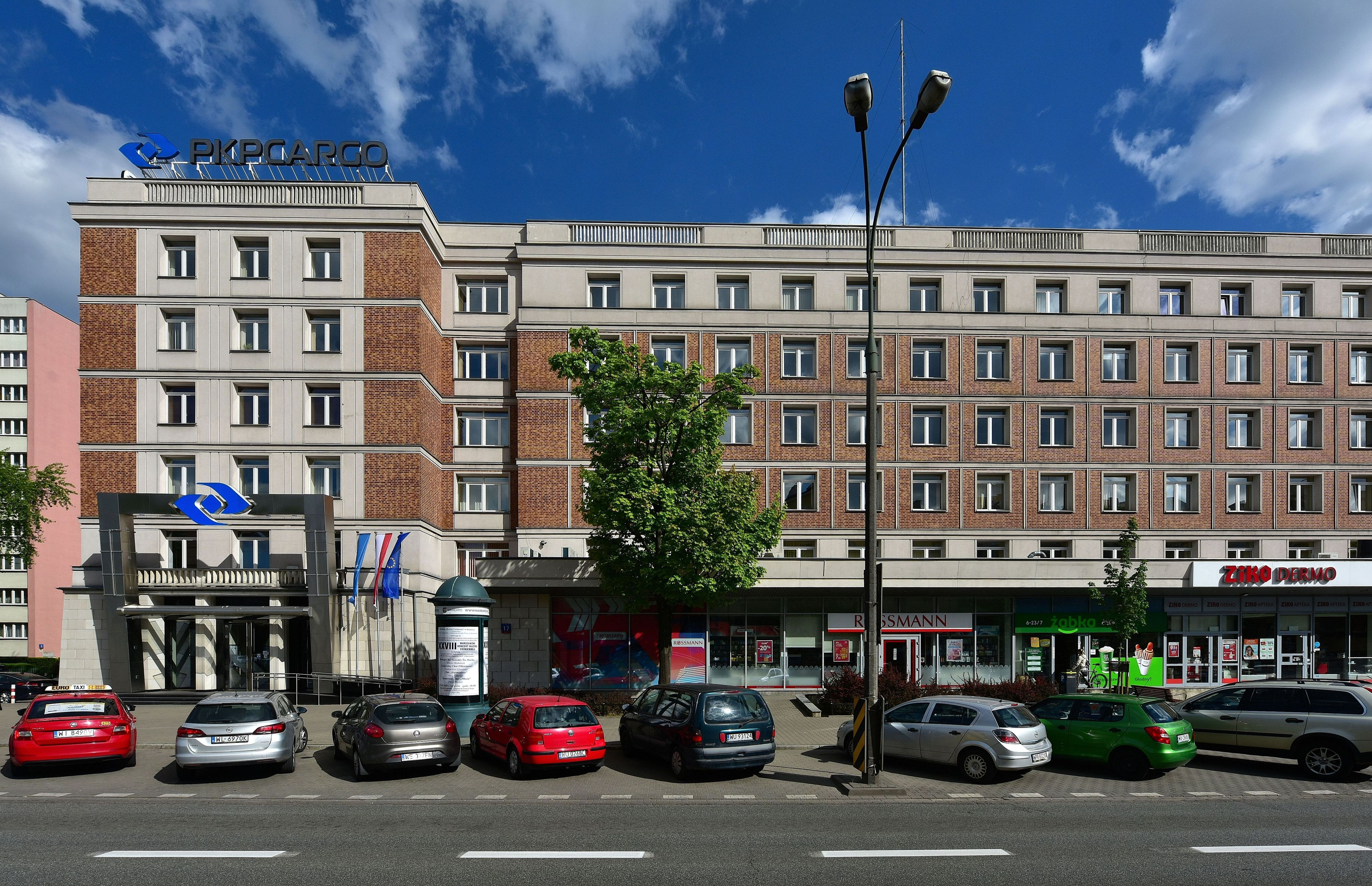 Siedziba spółki PKP Cargo przy ul. Grójeckiej 17 w Warszawie